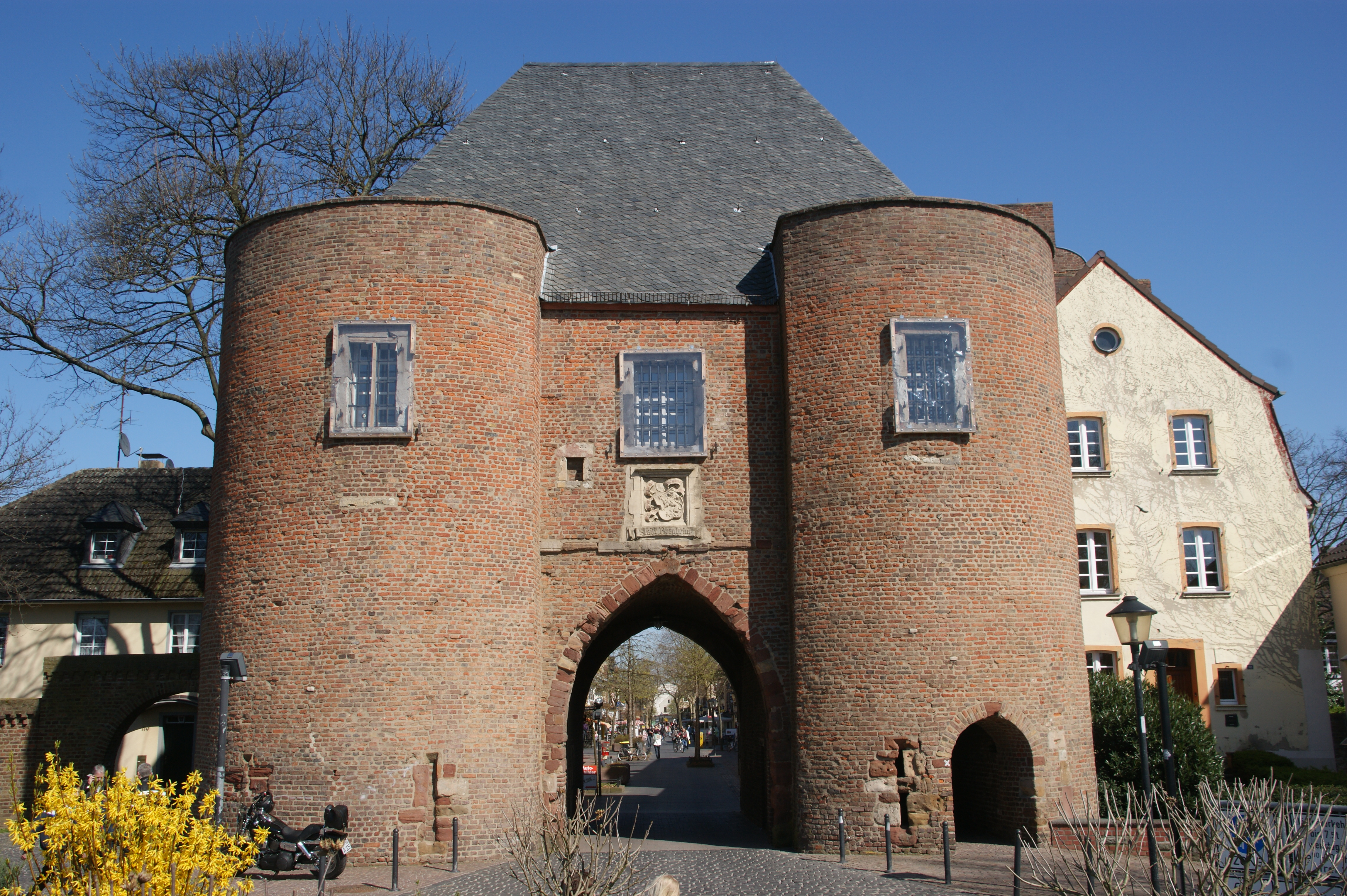 Aachener Tor in Bergheim (Rhein-Erft-Kreis)This is a photograph of an architectural monument.